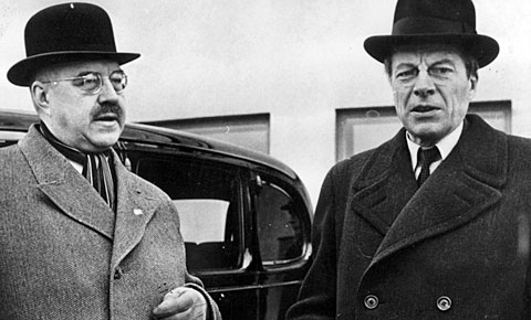 Rolf Witting och Christian Günther träffas under det mystiska mötet dem emellan våren 1941, strax innan Operation Barbarossa.